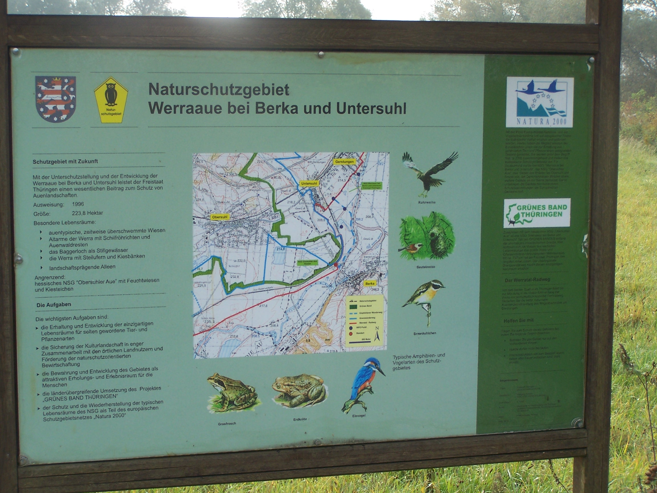 Infotafel zum NSG bei Berka/Werra.